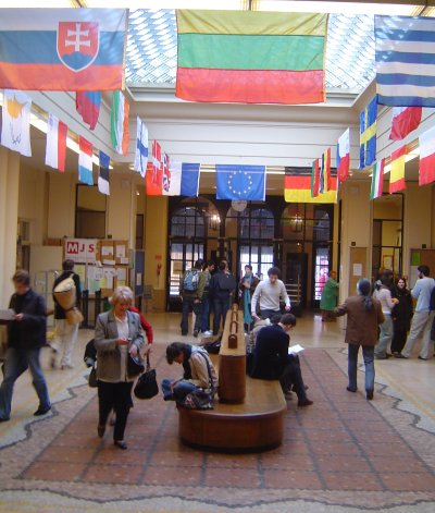 The famous "péniche" in Sciences Po, 27 rue Saint-Guillaume.